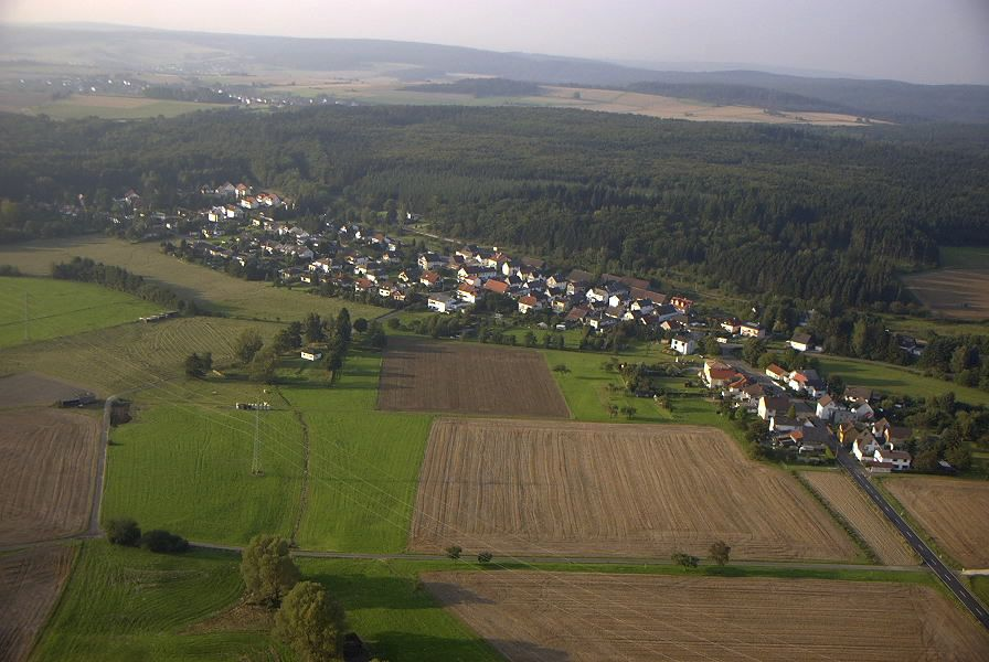 Luftbild Wilhelmsdorf/Taunus